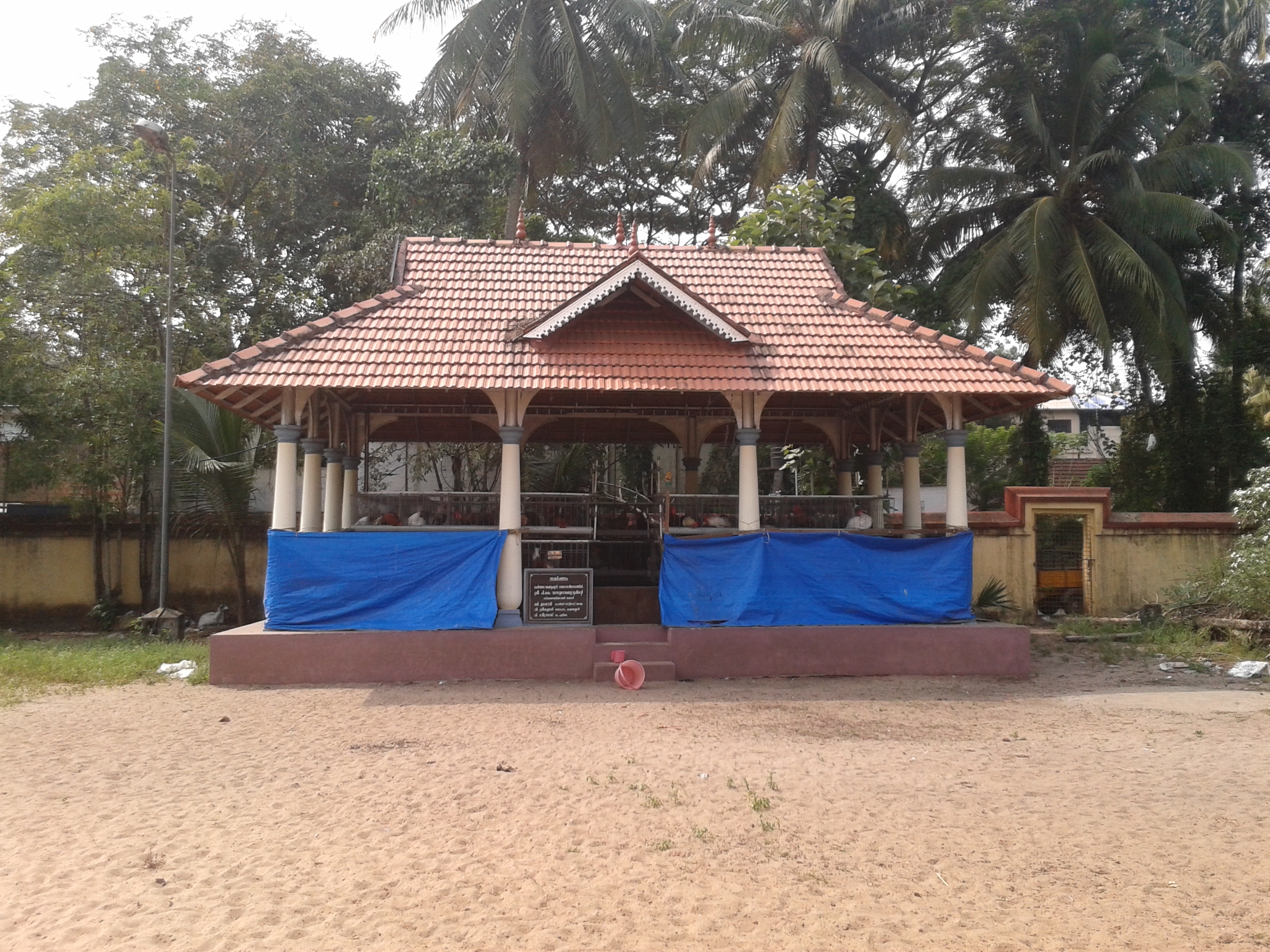 ചെർത്തല ശ്രീ കാർത്യായനി ദേവി ക്ഷേത്രത്തിലെ കോഴികളെ പാർപ്പിക്കാൻ സമർപ്പിച്ച കെട്ടിടം.